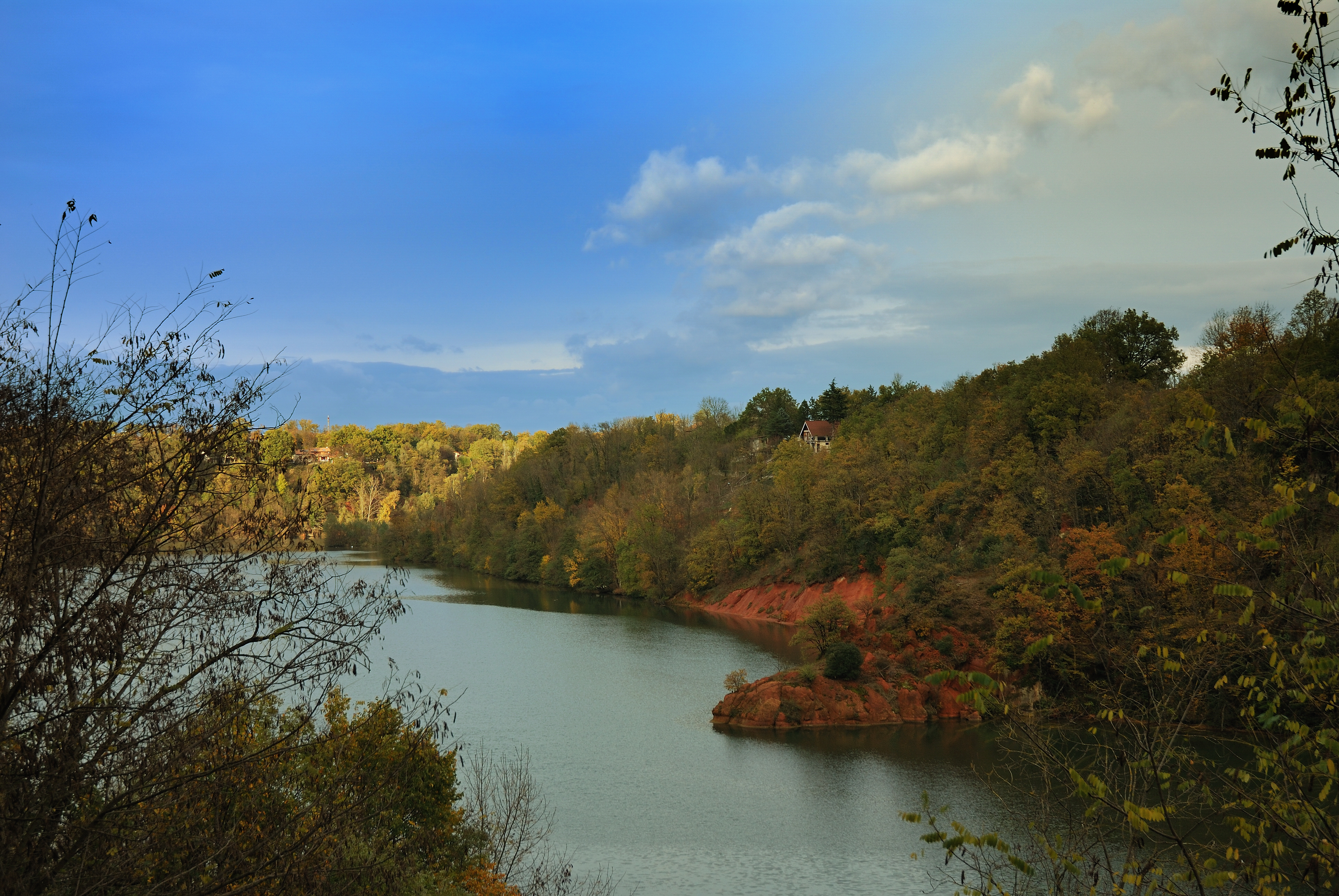 plan d'eau ferrugineuse a st nazaire en royans